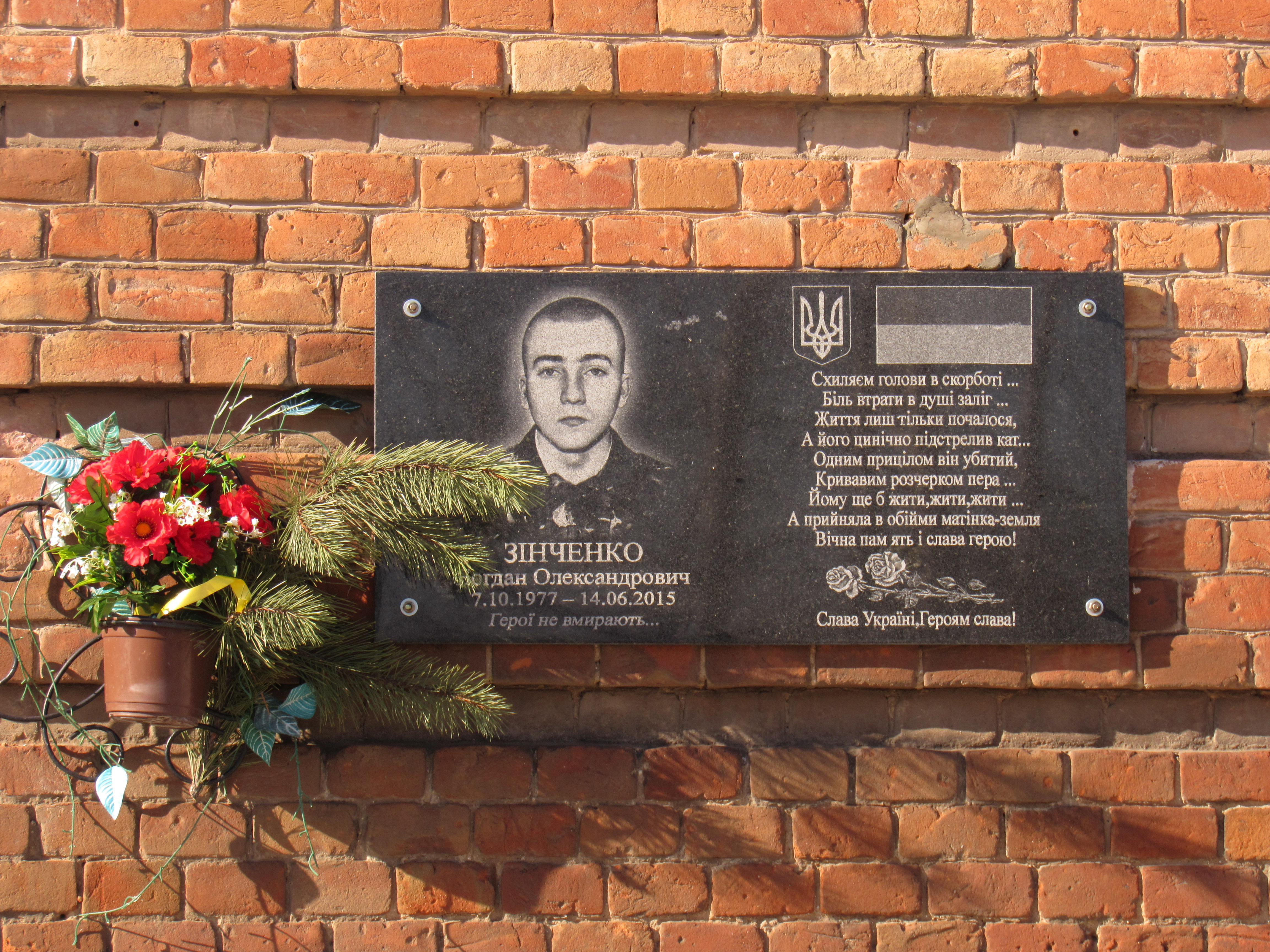 дошкапамяті